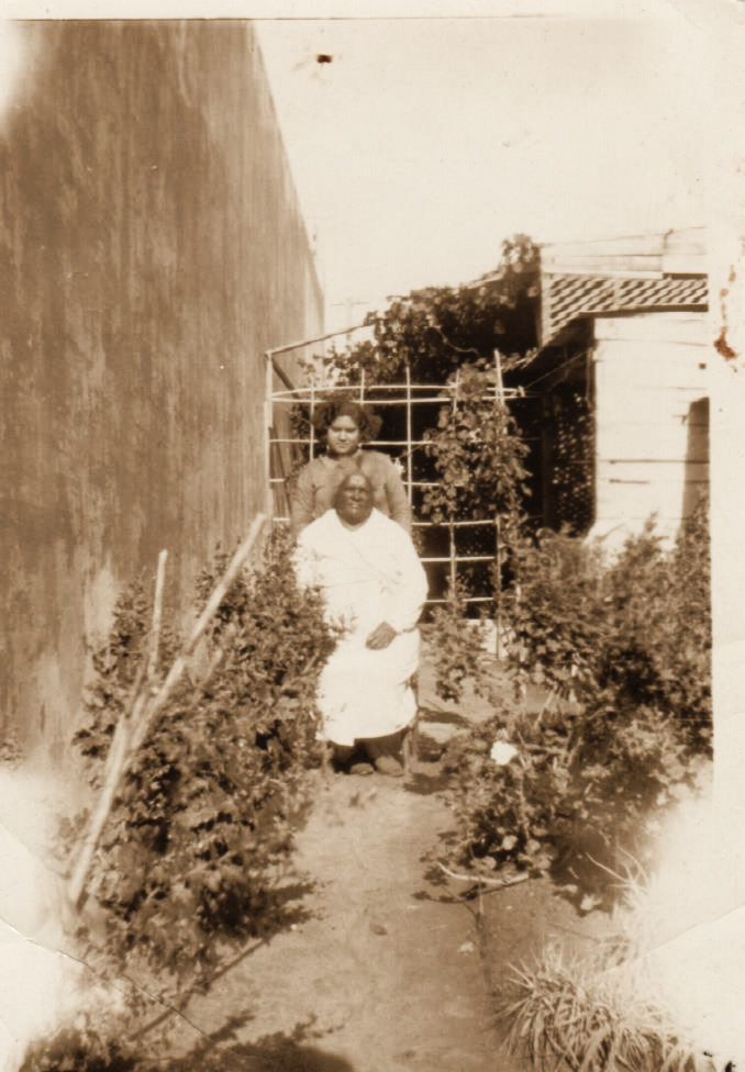 De pie, Mercedes Ramona, sentada Ramona Larrea, nieta del matrimonio de Ignacio Larrea y Felipa Larrea. Bisnetada de Juan Larrea y María Magdalena Rodríguez